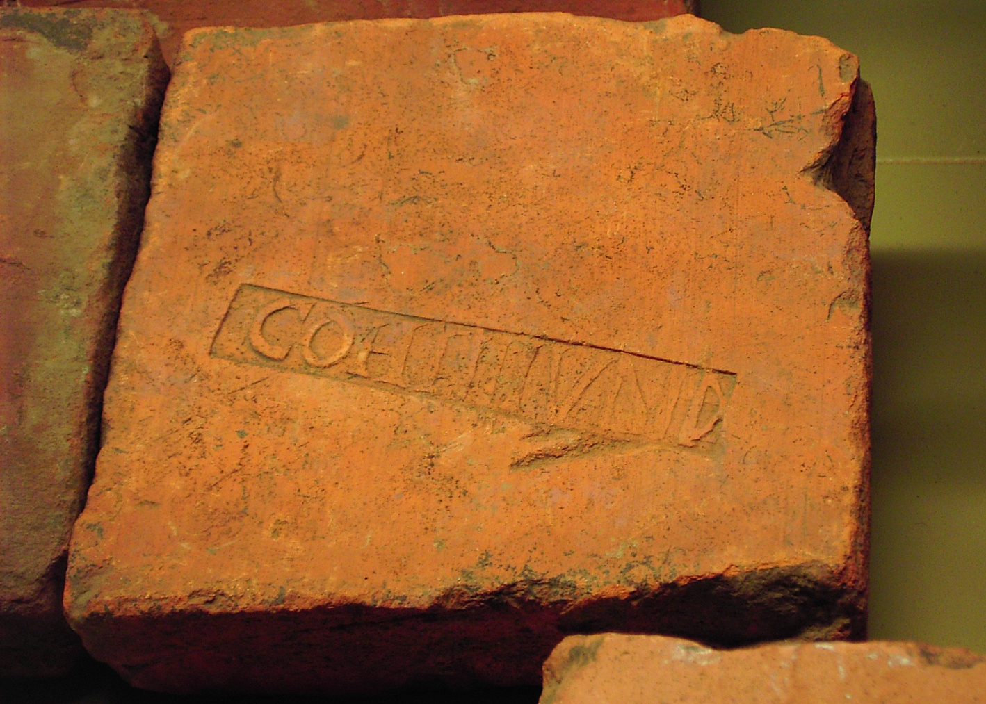 Ziegelstempel der IV. Vindeliker-Kohorte aus Großkrotzenburg. Foto aus dem Museum (mit freundl. Genehmigung).